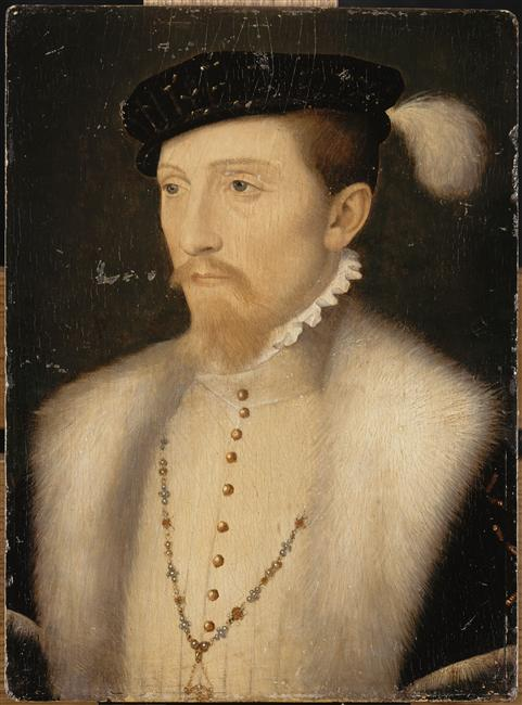 Portrait de Jean III d'Ailly d'Annebault, baron de Retz